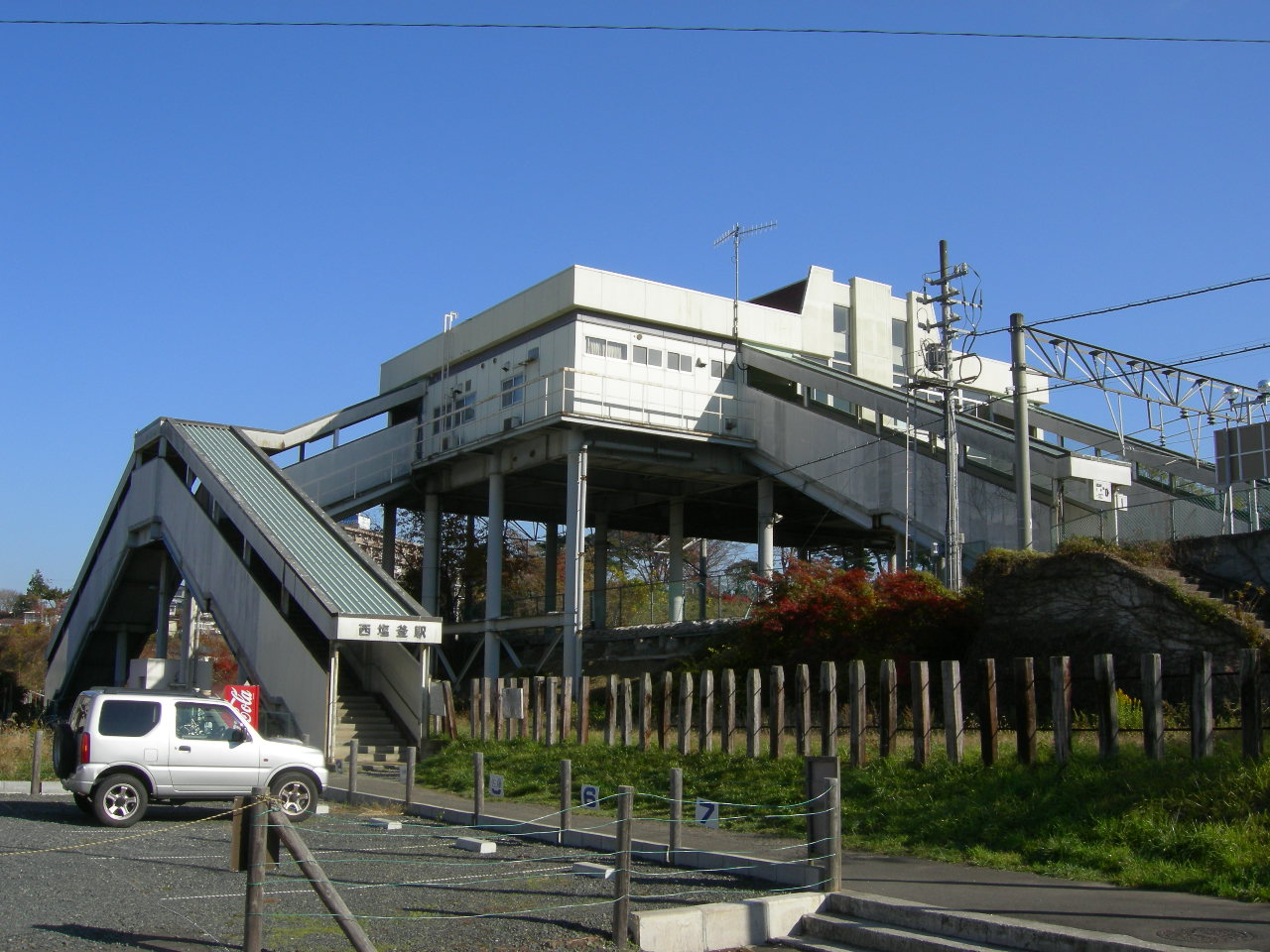 JR仙石線（JR senseki line）西塩釜駅（Nishi-Shiogama station）駅舎